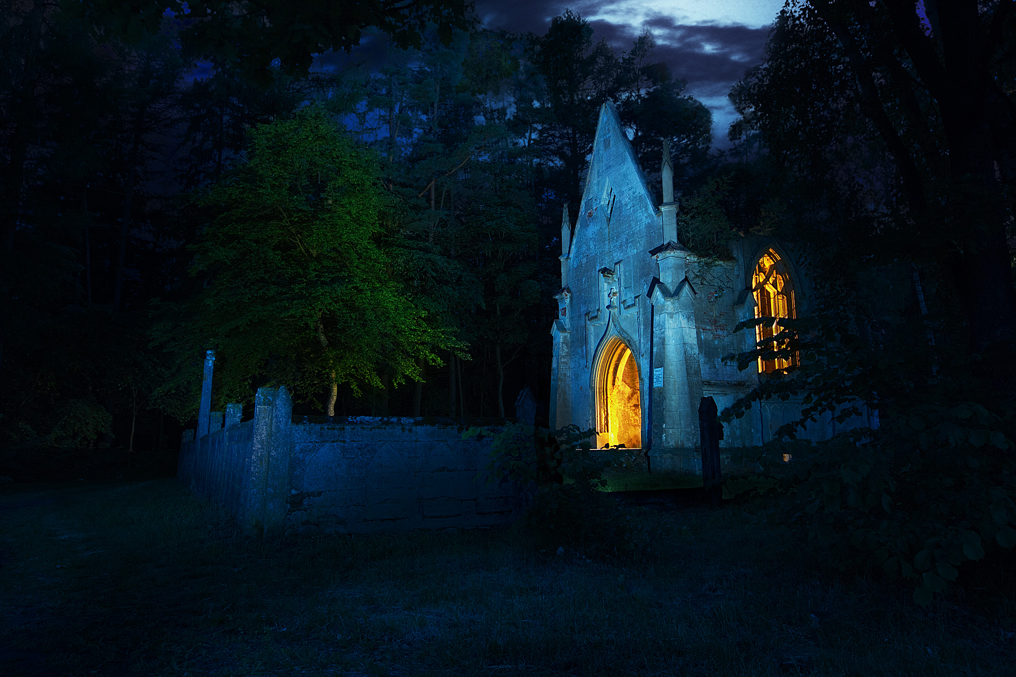 Беларуская (тарашкевіца): Комплекс былой сядзібы Рэйтанаў: капліца. Грушаўка This is a photo of Belarusian heritage monument. Reference number: 112Г000473 ( WLM)